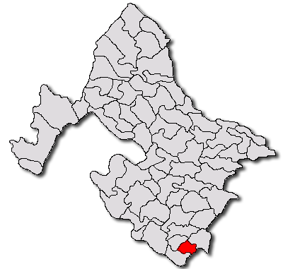 Categorie:Hărţi ale judeţului Mehedinţi